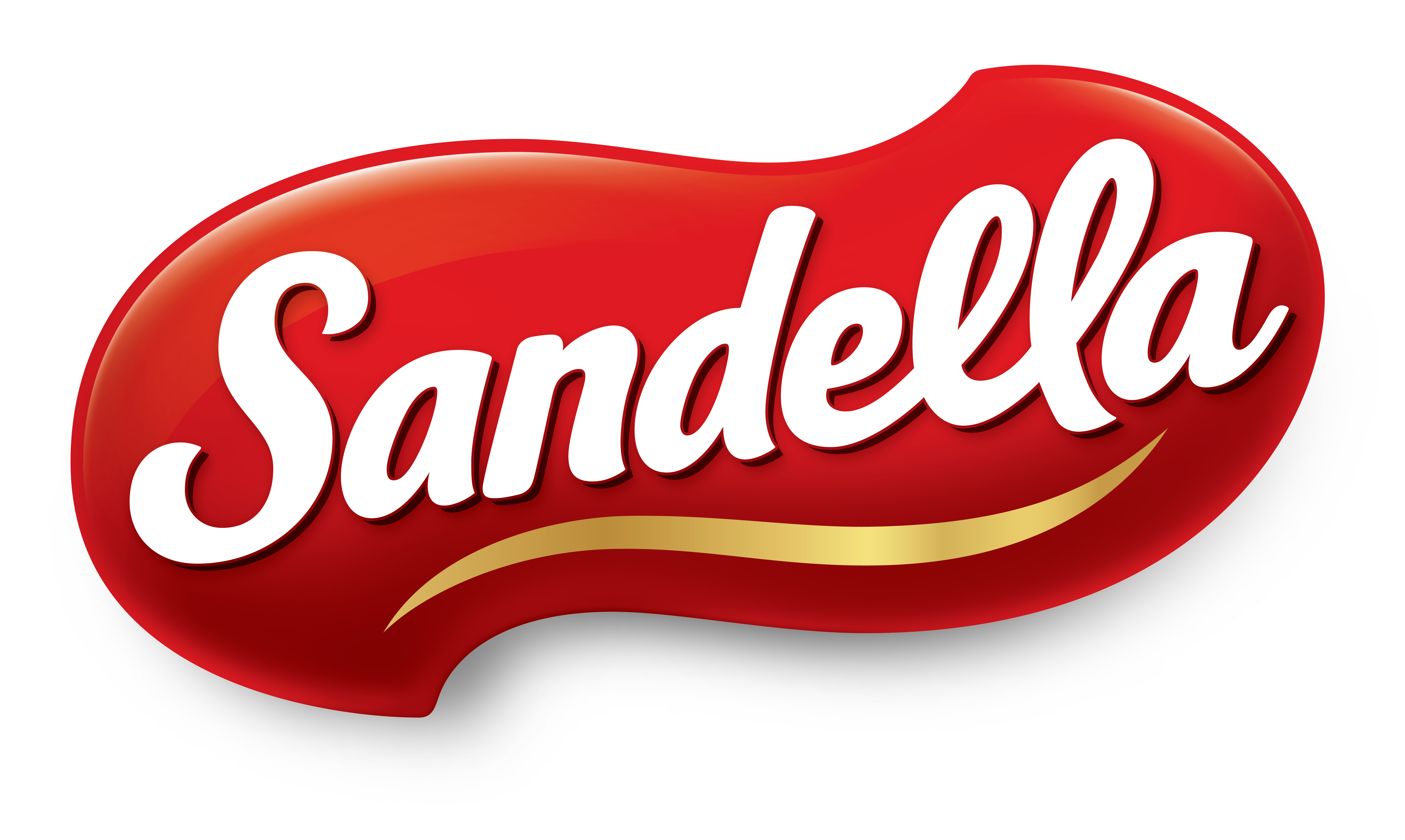 logo sandella